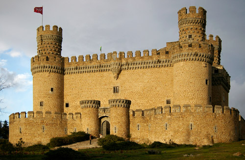 Castillo de Manzanares el Real al atardecer